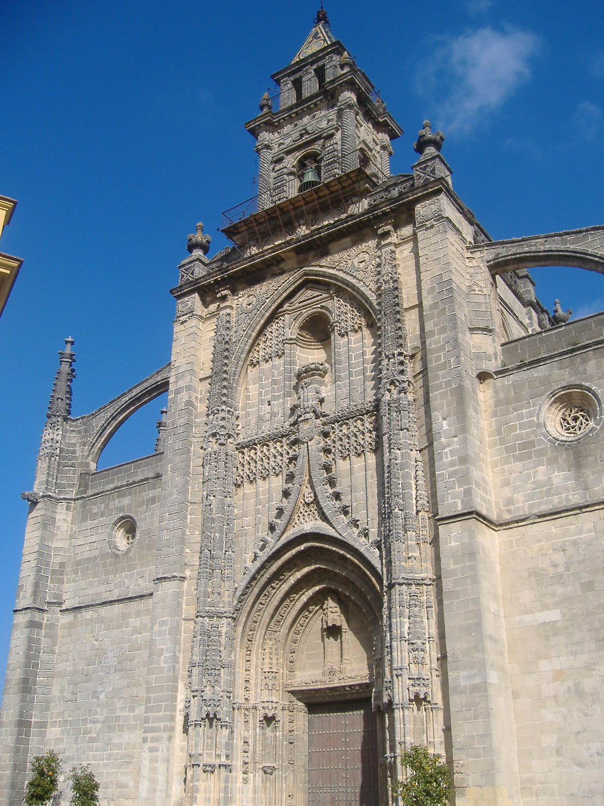 Jerez de la Fra. Iglesia de Santiago. Fachada gótica.JPG